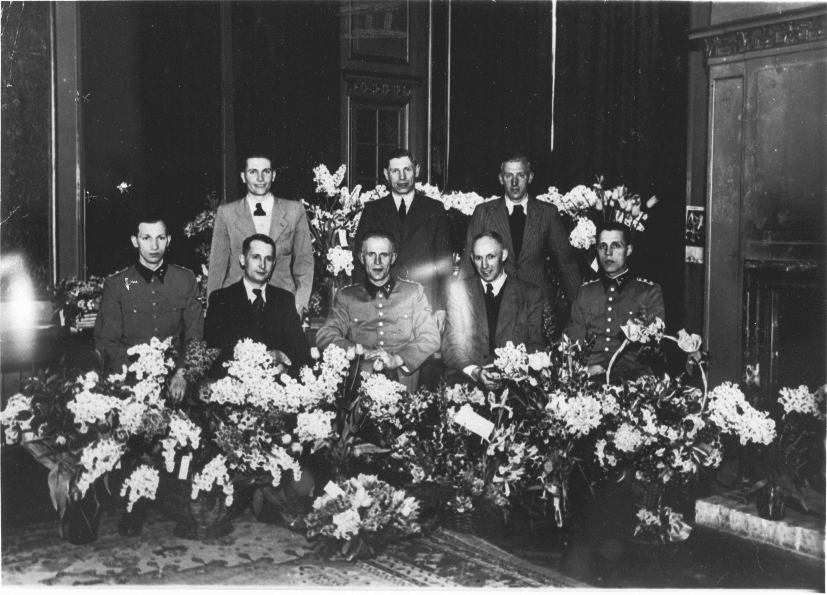 Zittende v.l.n.r. Spaans, Websel (D), Leemhuis, Korsthorst (D), Heynis (plv. van Leemhuis). Staande v.l.n.r. Van der Weiden, Freiling, Osendarp. Gernen ontbreekt. Het Commando Leemhuis (SD-Einsatzcommando Leemhuis) was een nazi-organisatie in de Tweede Wereldoorlog die was opgericht door de onderinspecteur van de Haagse politie en NSB’er Cornelis Leemhuis. Het commando stond in de wijde omgeving van Den Haag bekend als berucht en gevreesd.